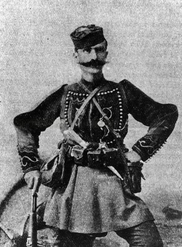 Теодорос Кукулакис